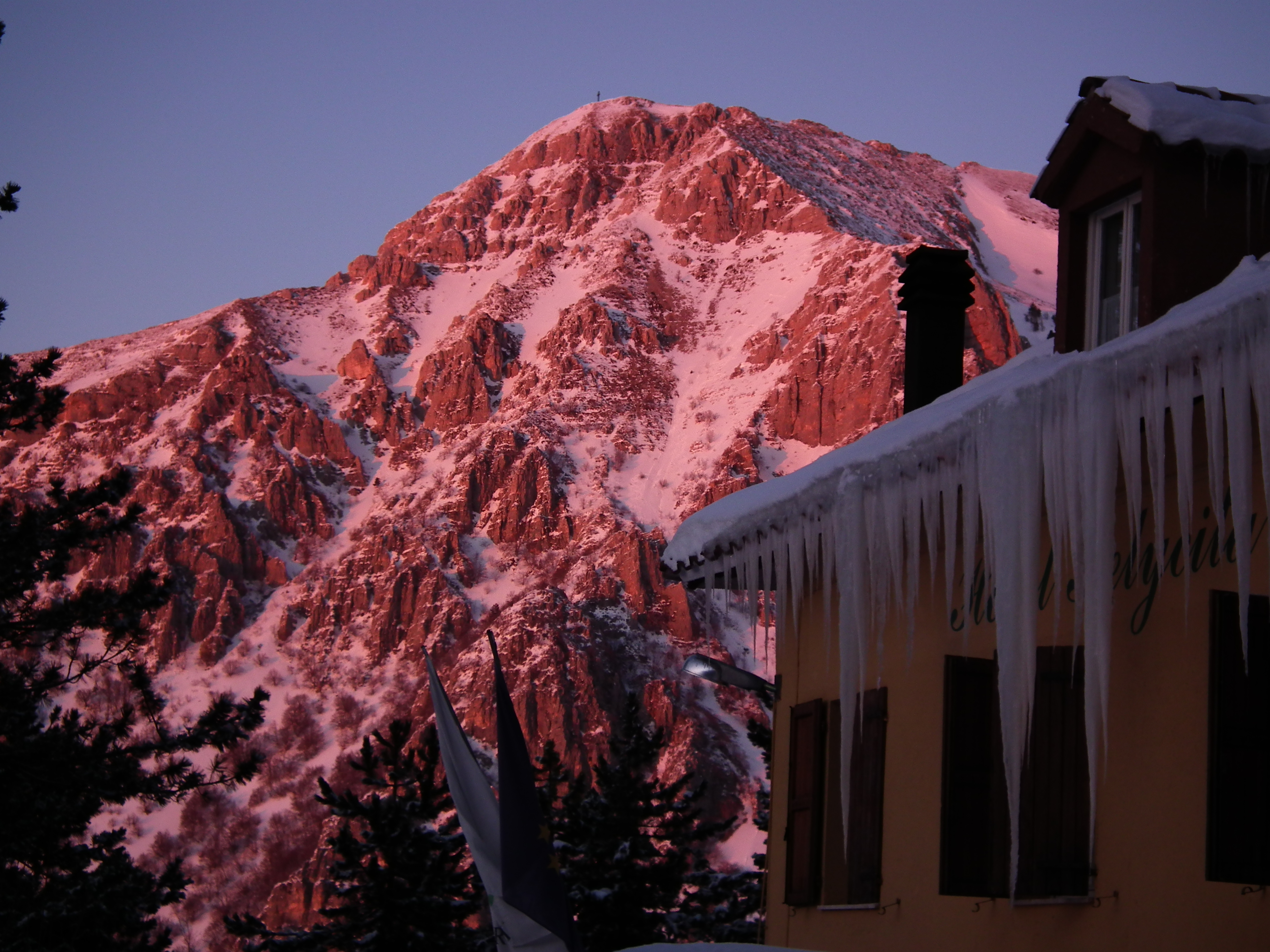 Monte Bove